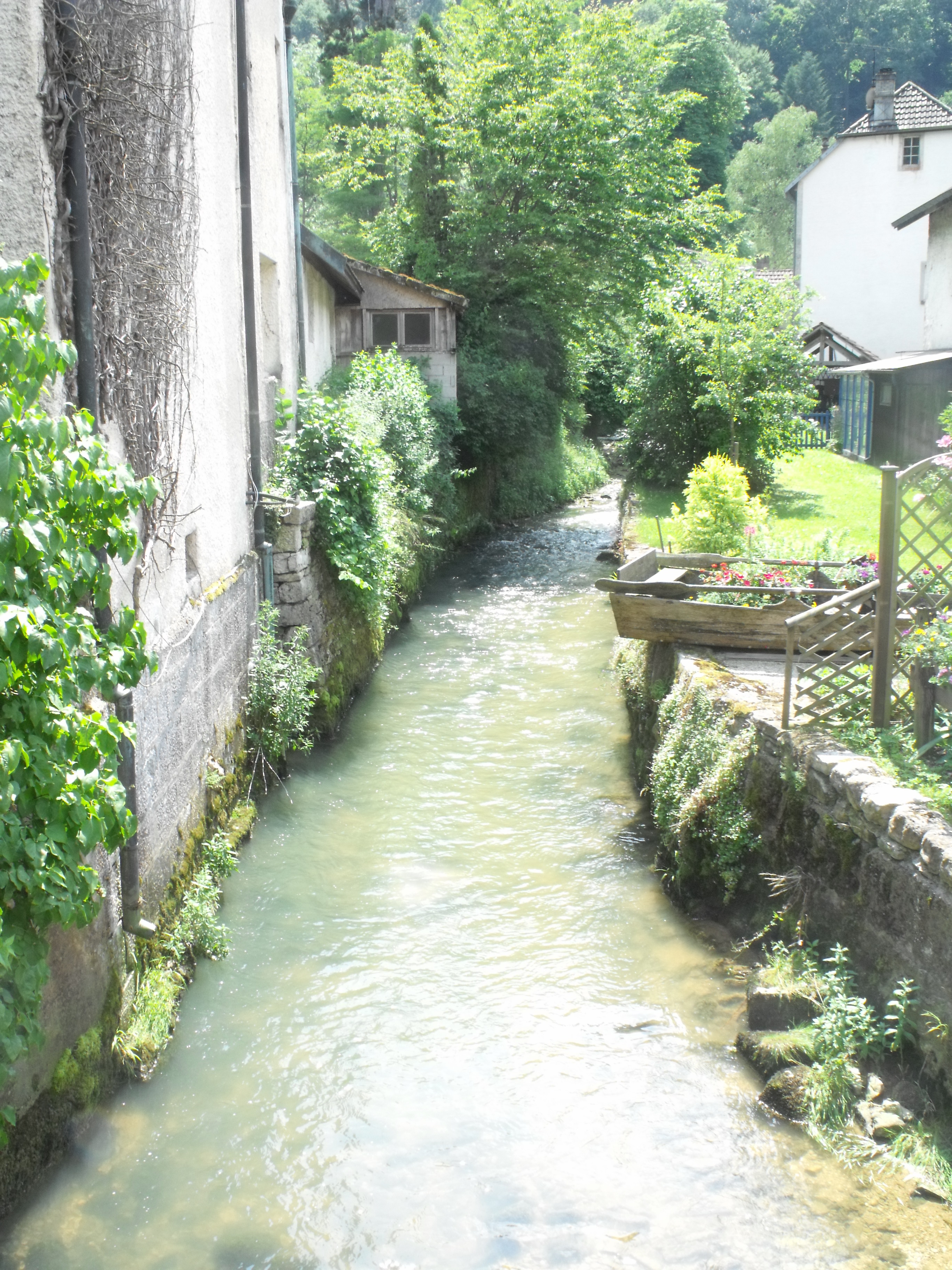 Ruisseau dans le village de Bief, Doubs, France